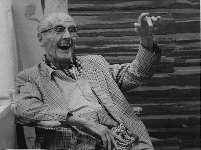 flautista i compositor